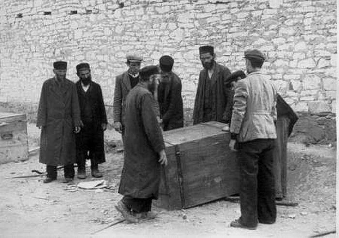 Annopolscy Żydzi podczas prac przymusowych